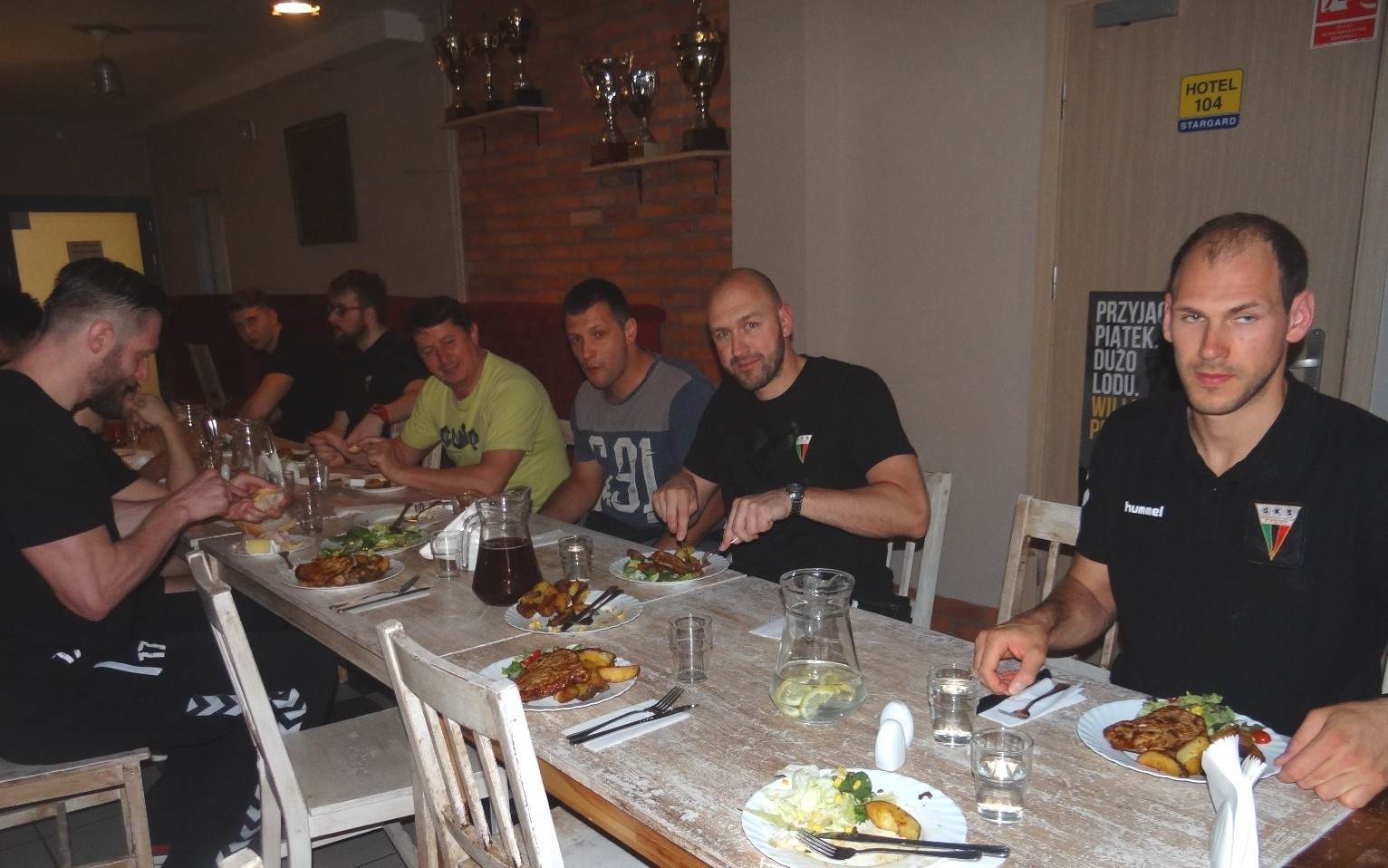 Pomeczowa kolacja w Stargardzie GKS Tychy, 29.04.2018